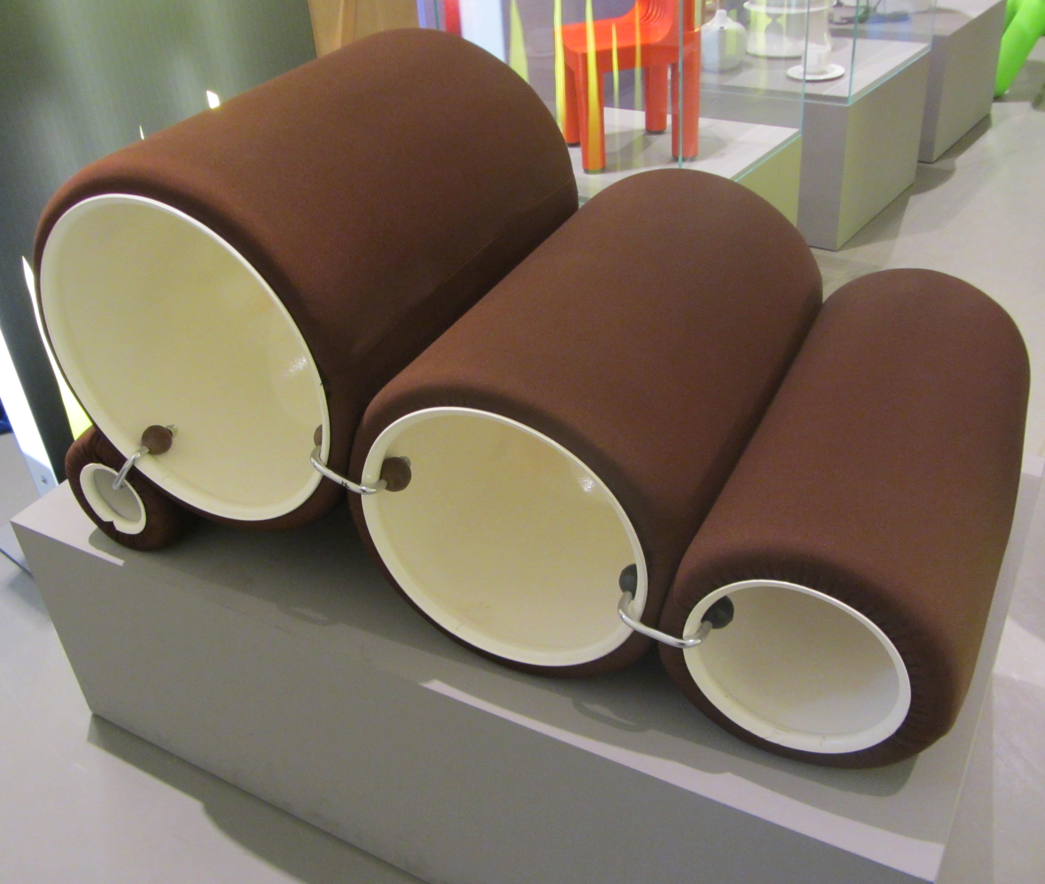 La poltrona "Tube Chair" di Flexform progettata da Joe Colombo al Triennale Design Museum durante la mostra "le fabbriche dei sogni"